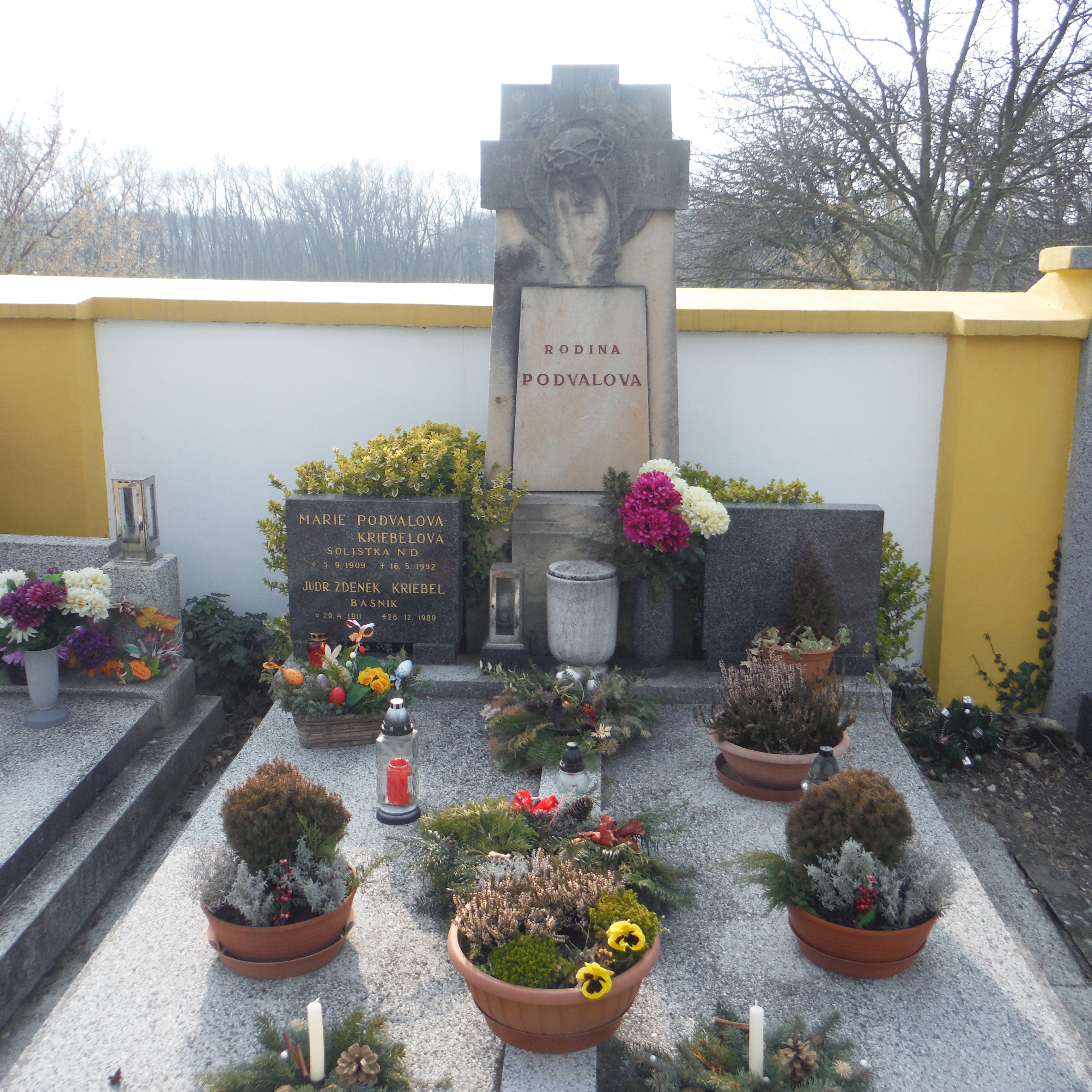 hrob